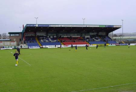 Vitoria Park dingwall